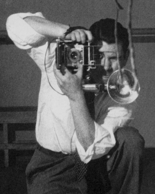 Héctor García como fotógrafo